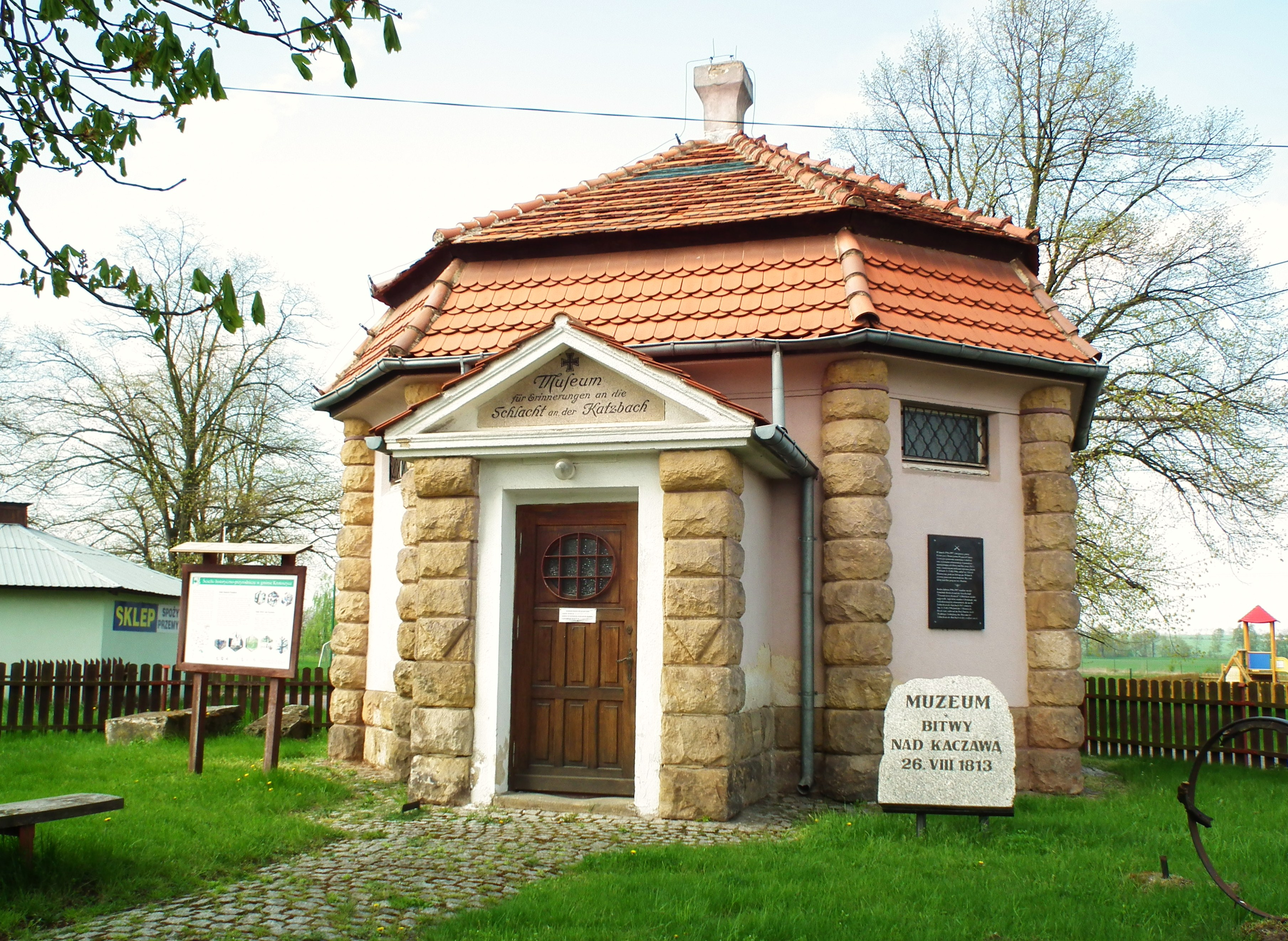 Muzeum Bitwy nad Kaczawą w Duninie.